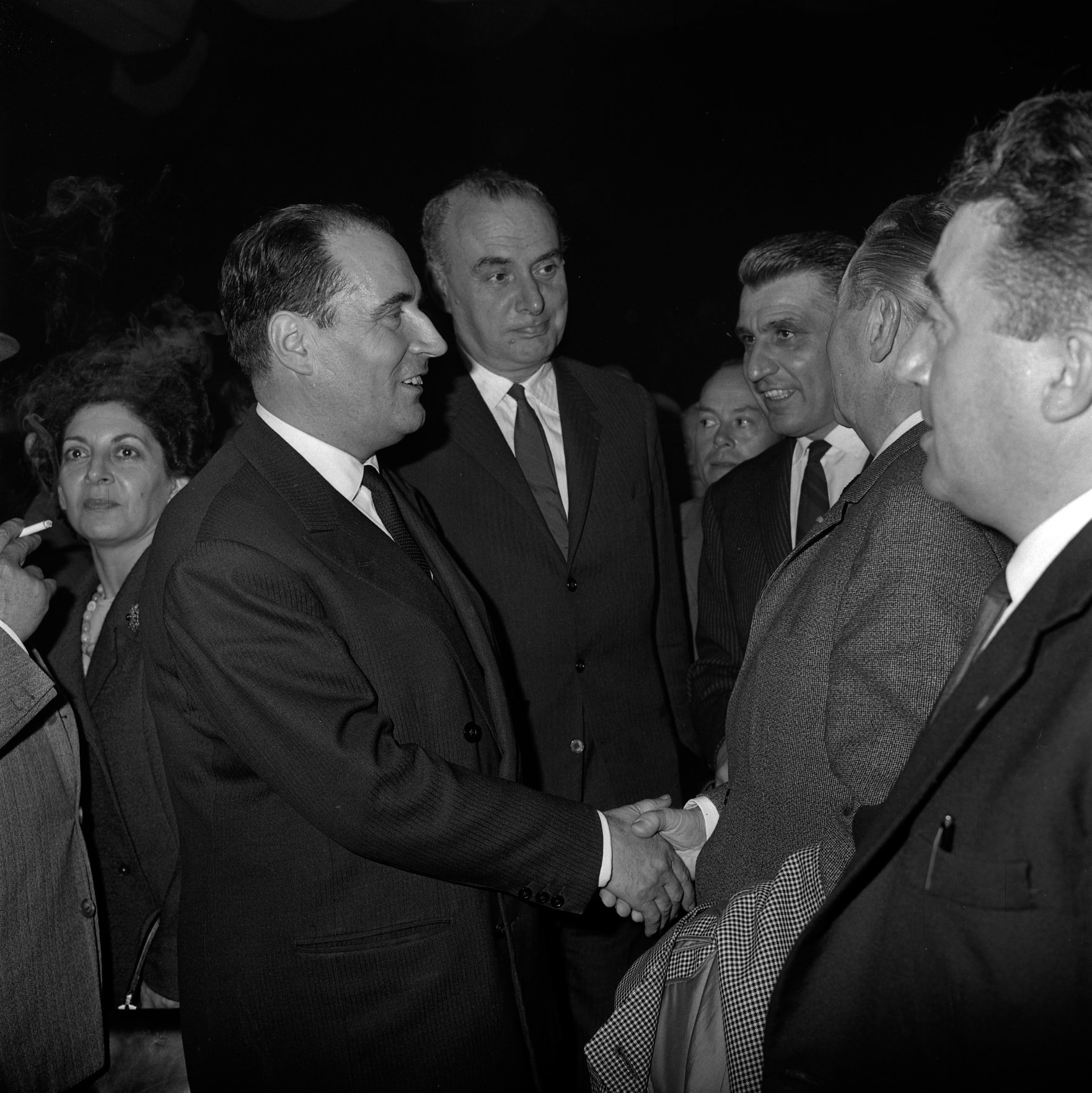 Pas de lieu. Le 20 Octobre 1965. Vue de François Mitterand en visite à Toulouse, lors d'un meeting.